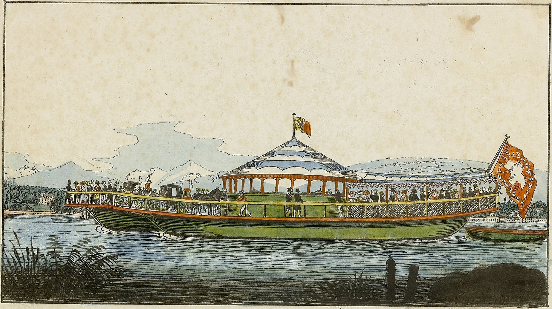 Bateau-manège créé par Mauriac Père de Bordeaux en 1825 pour la traversée de la rade de Genève. Le bateau est constitué de deux embarcations, il est actionné par des chevaux dont la rotation fait mouvoir des roues à aubes placées entre les coques.